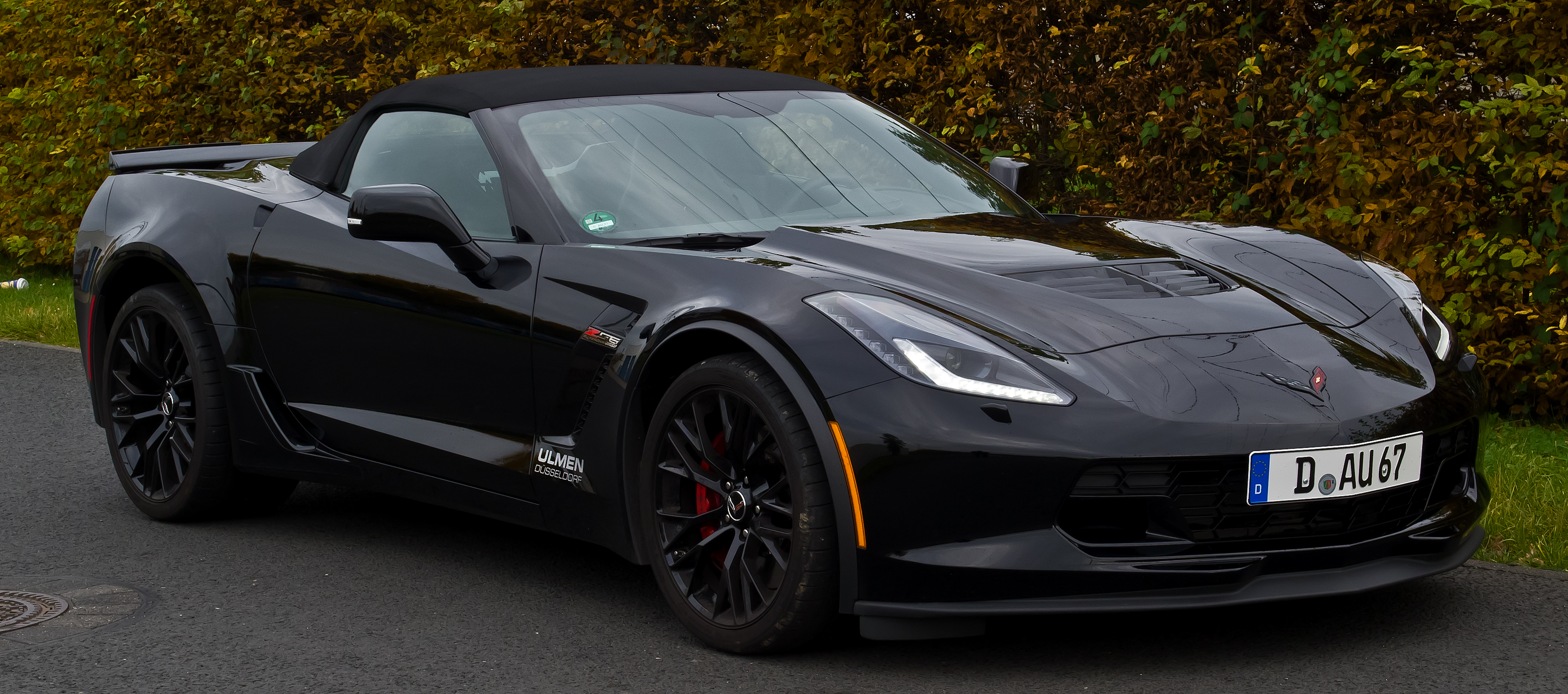 Corvette Z06 Cabriolet (C7)